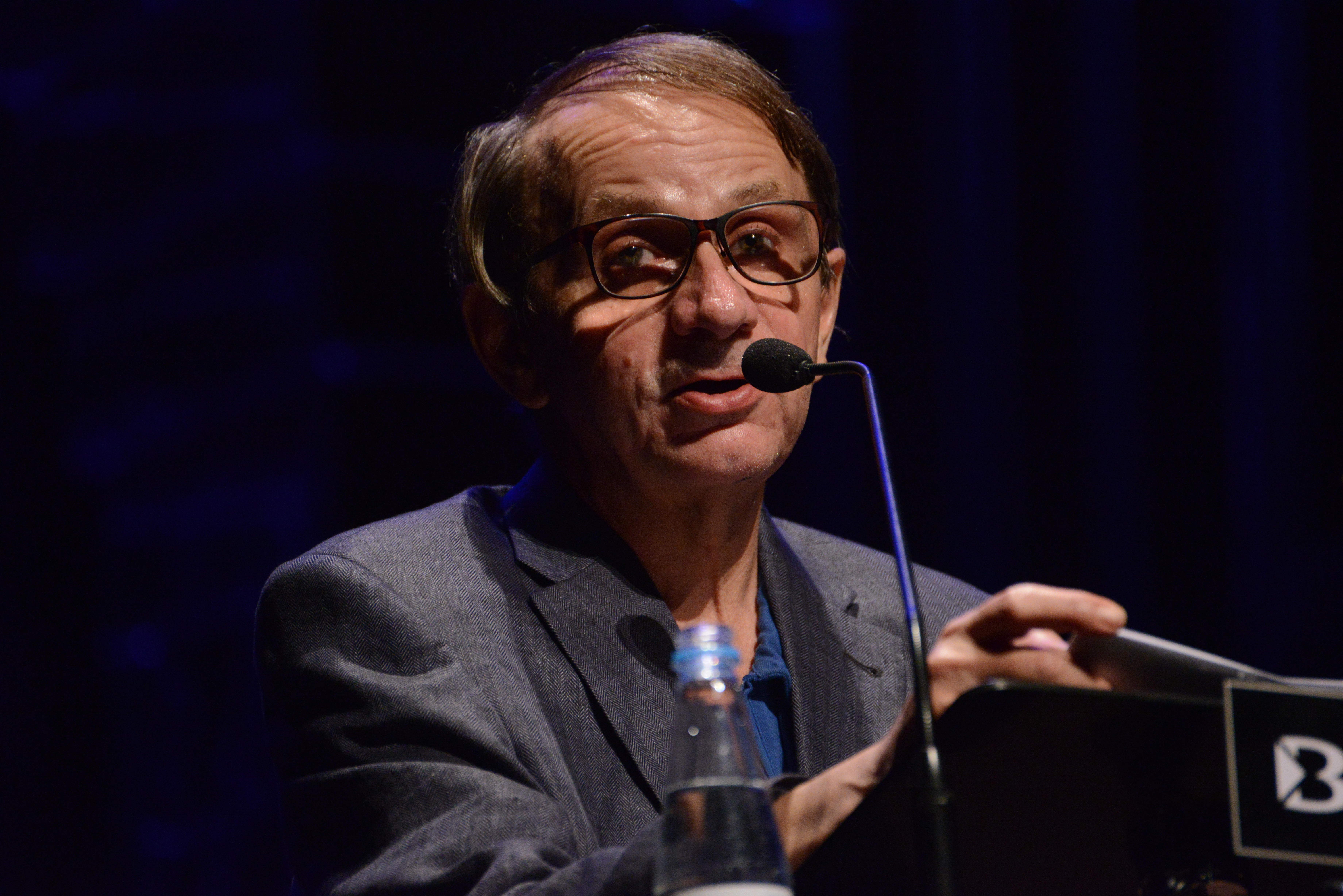 Convidado: Michel Houellebecq, escritor francês Data: 07 de novembro de 2016 Local: Salão de Atos da UFRGS Crédito das imagens: Fronteiras do Pensamento | Luiz Munhoz